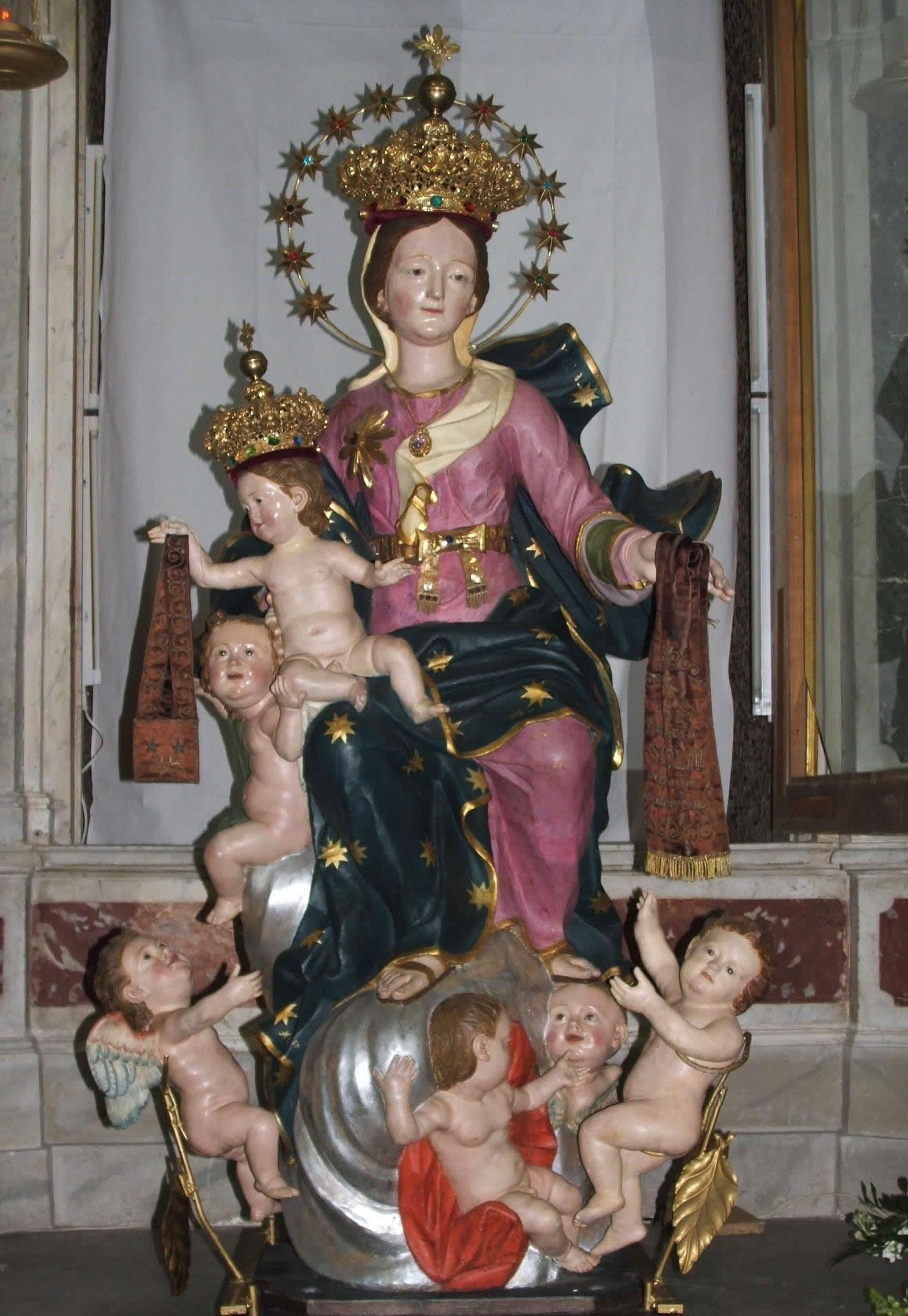 La statua di Maria Santissima del Carmelo, venerata all'interno dell'omonimo santuario a Palmi.